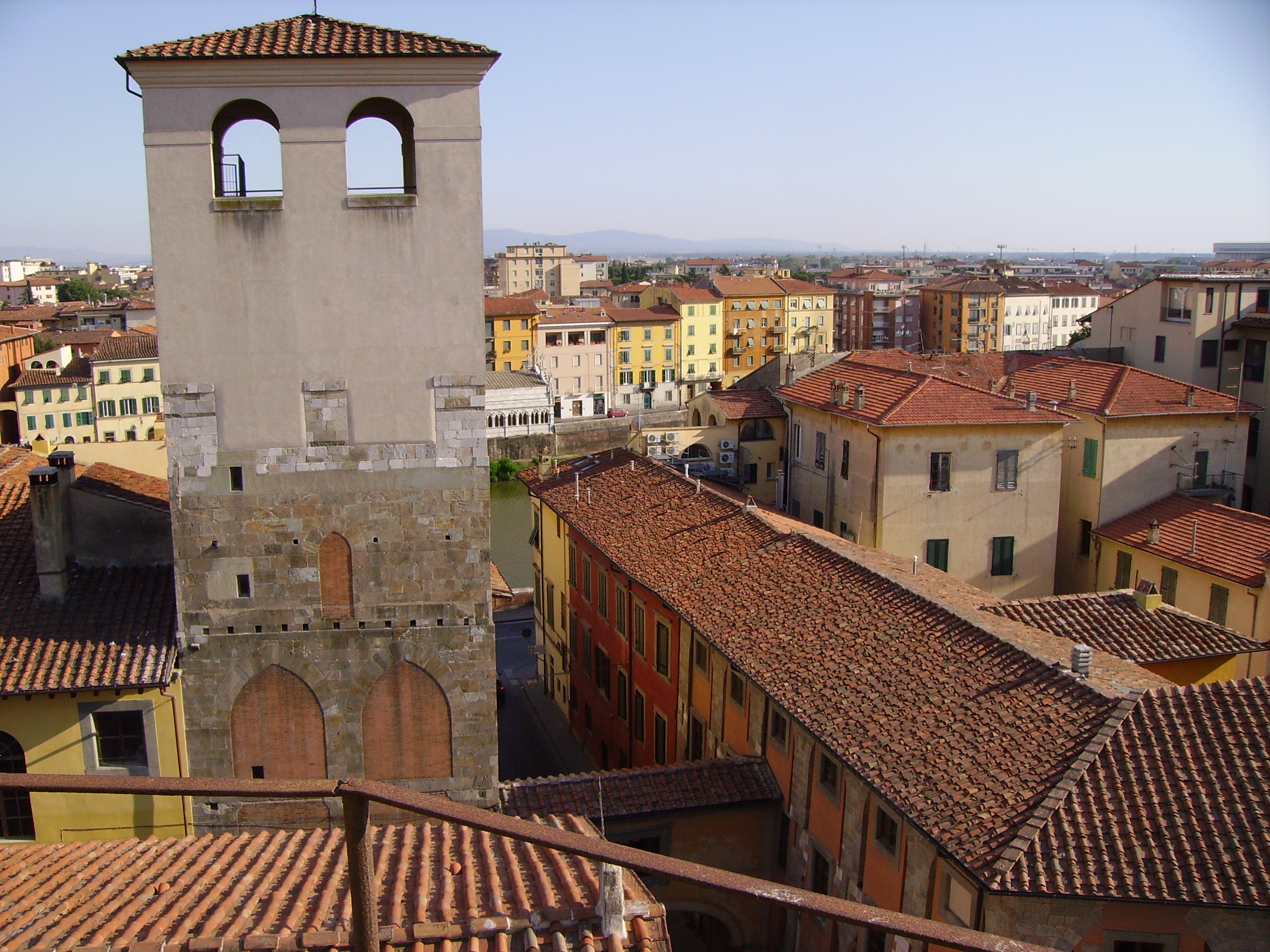 La Torre de Cantone con a destra il sottostante passaggio coperto al palazzo delle vedove; al centro l'arno e un particolare della Chiesa della Spina